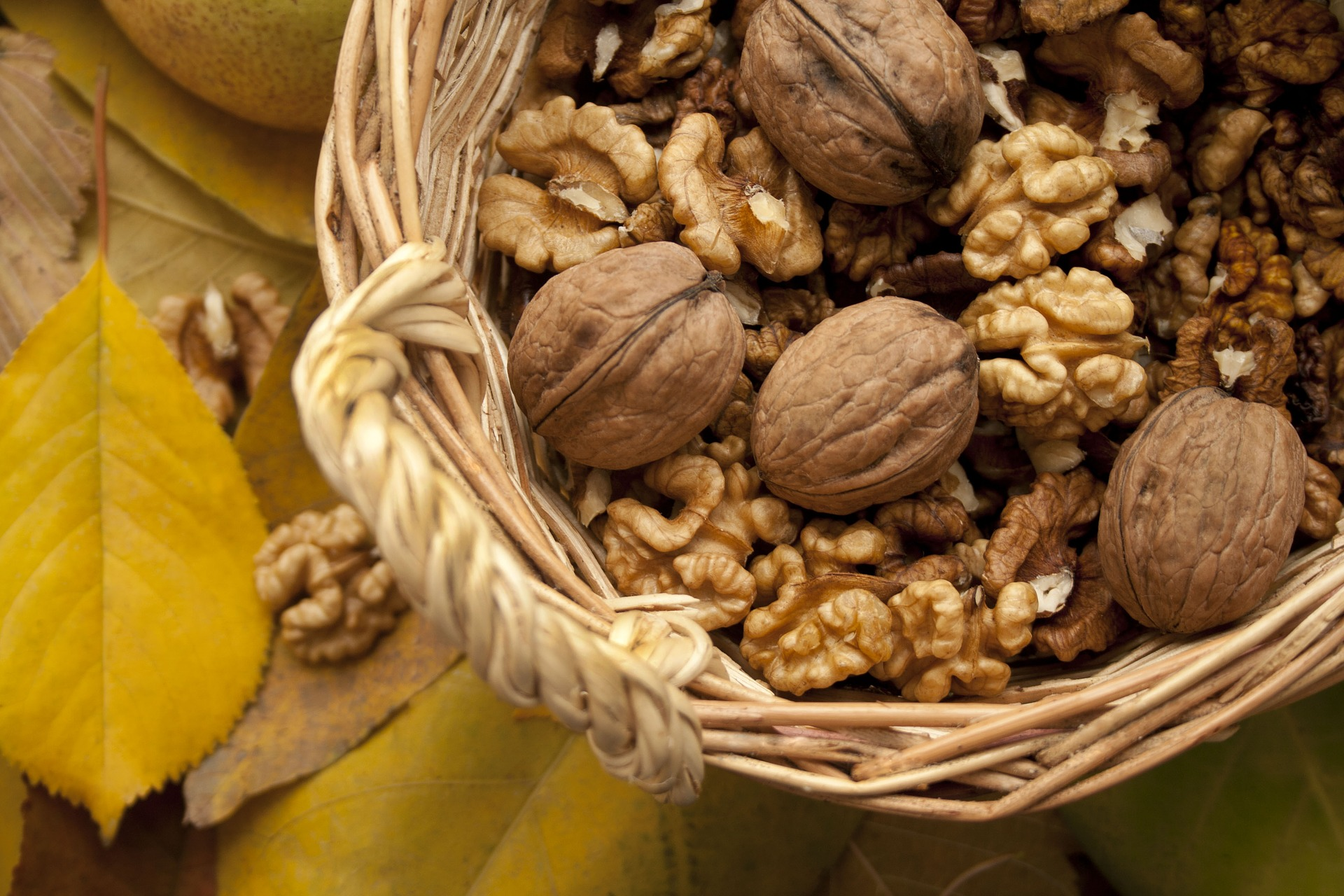 Panier de noix de Grenoble